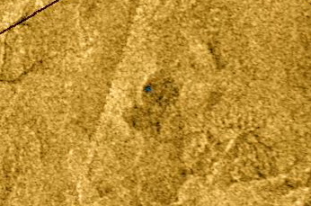 トワダ湖の合成開口レーダー画像